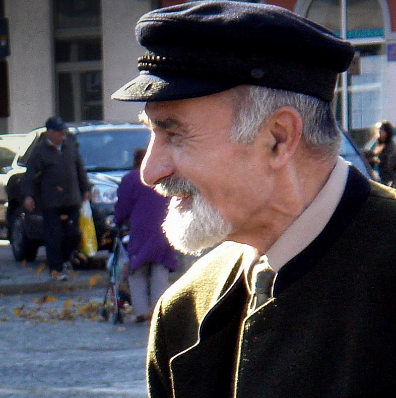 Artysta Karol Parno Gierliński ( 1938-2015 ), rzeźbiarz, konserwator, poeta, autor elementarza "Miri szkoła" napisanego w dialekcie "polska Roma". Śero Rom w filmie "Papusza".